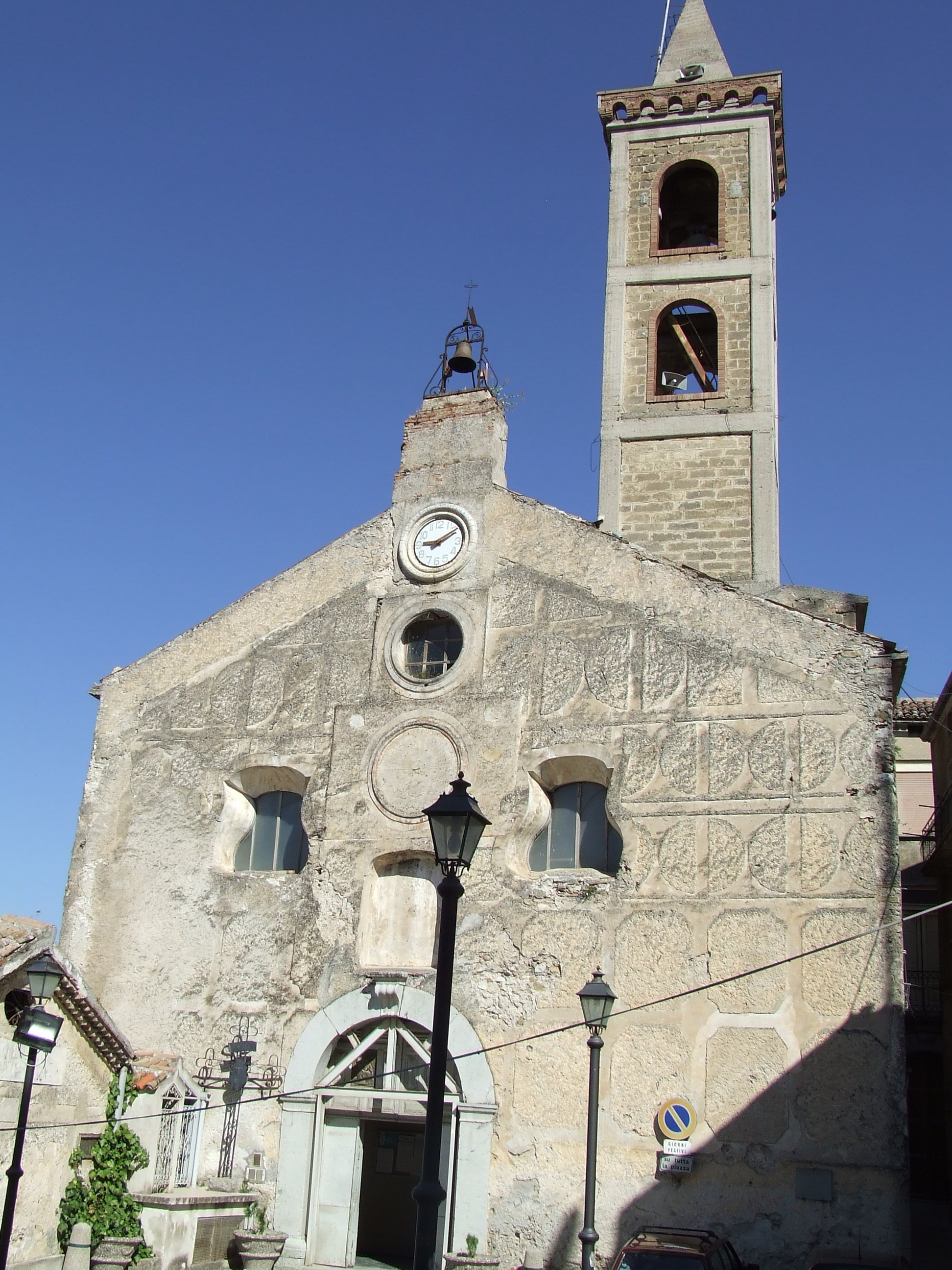 Chiesa del SS Salvatore di Caggiano